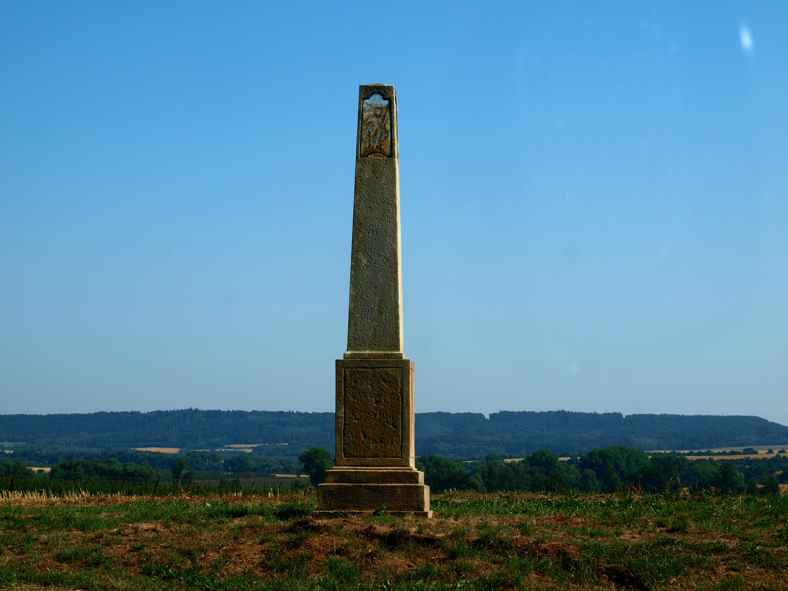 Nesuchyně, Boží muka